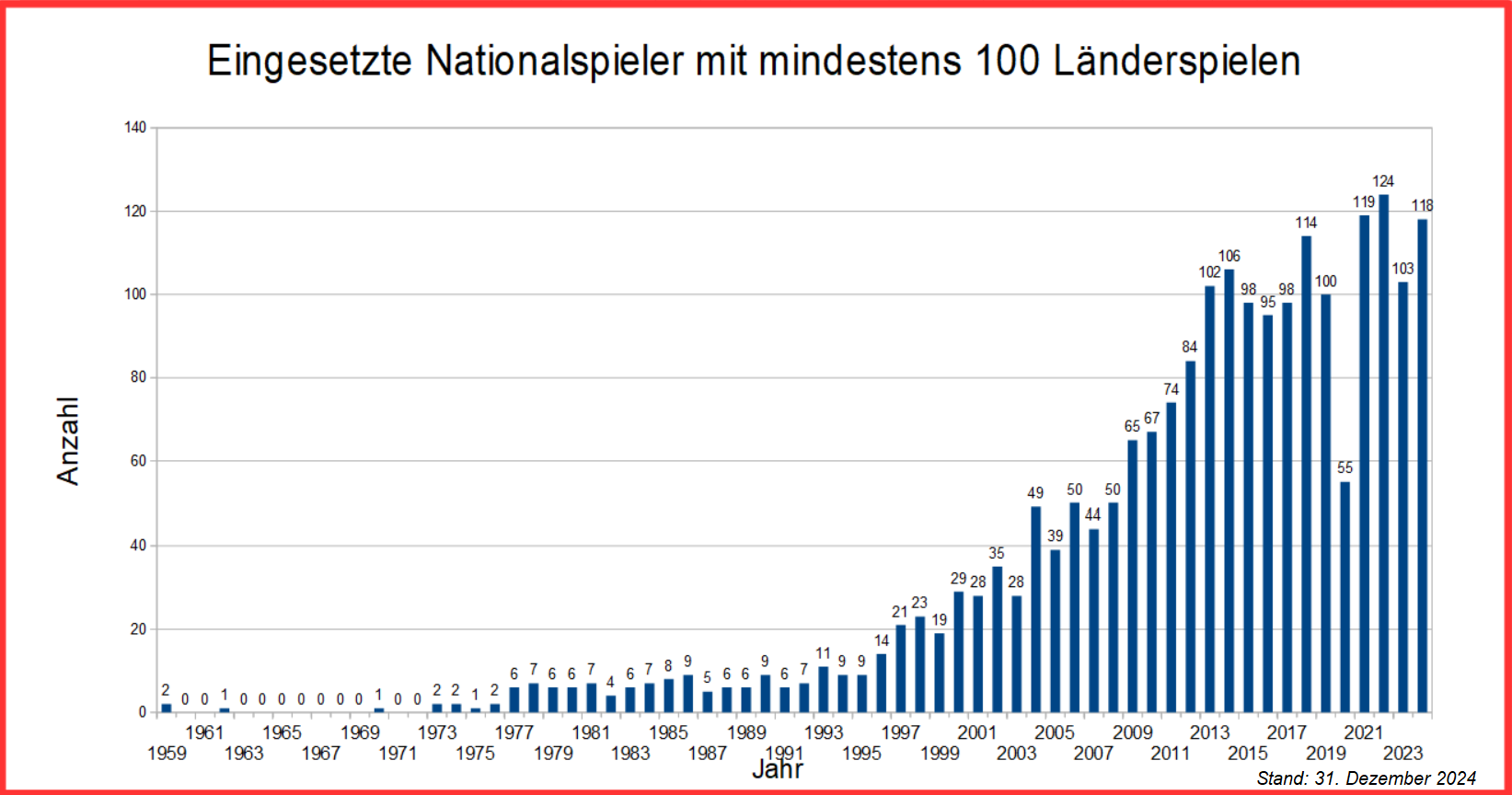 Anzahl der aktiven Nationalspieler mit mindestens 100 Länderspielen. Berücksichtigt wurden nur Spieler, die im jeweiligen Jahr in einem A-Länderspiel zum Einsatz kamen.